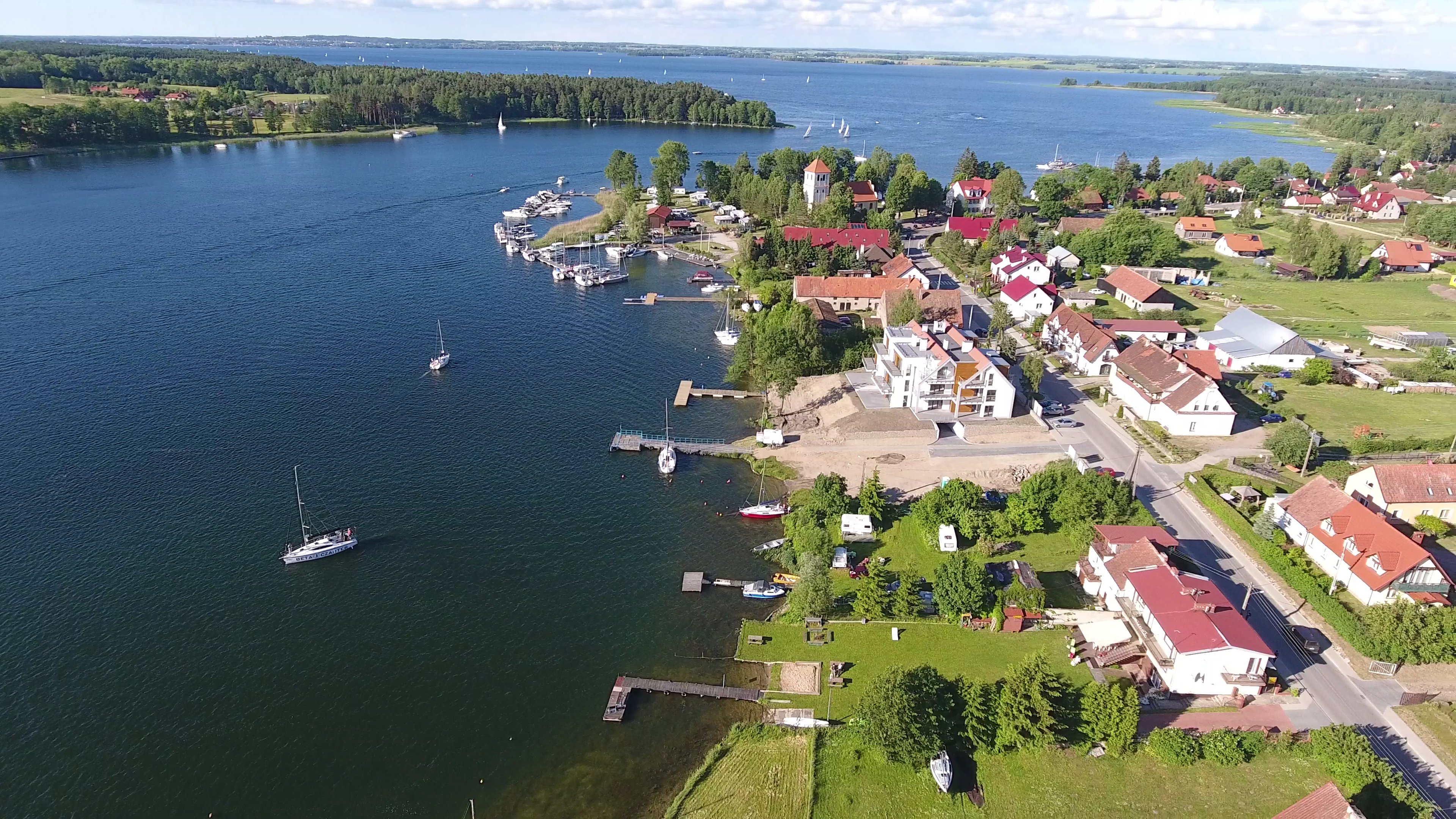 Cześć Szlaku Wielkich Jezior Mazurskich: przesmyk w okolicach Rydzewa między jeziorem Bocznym a Niegocinem.